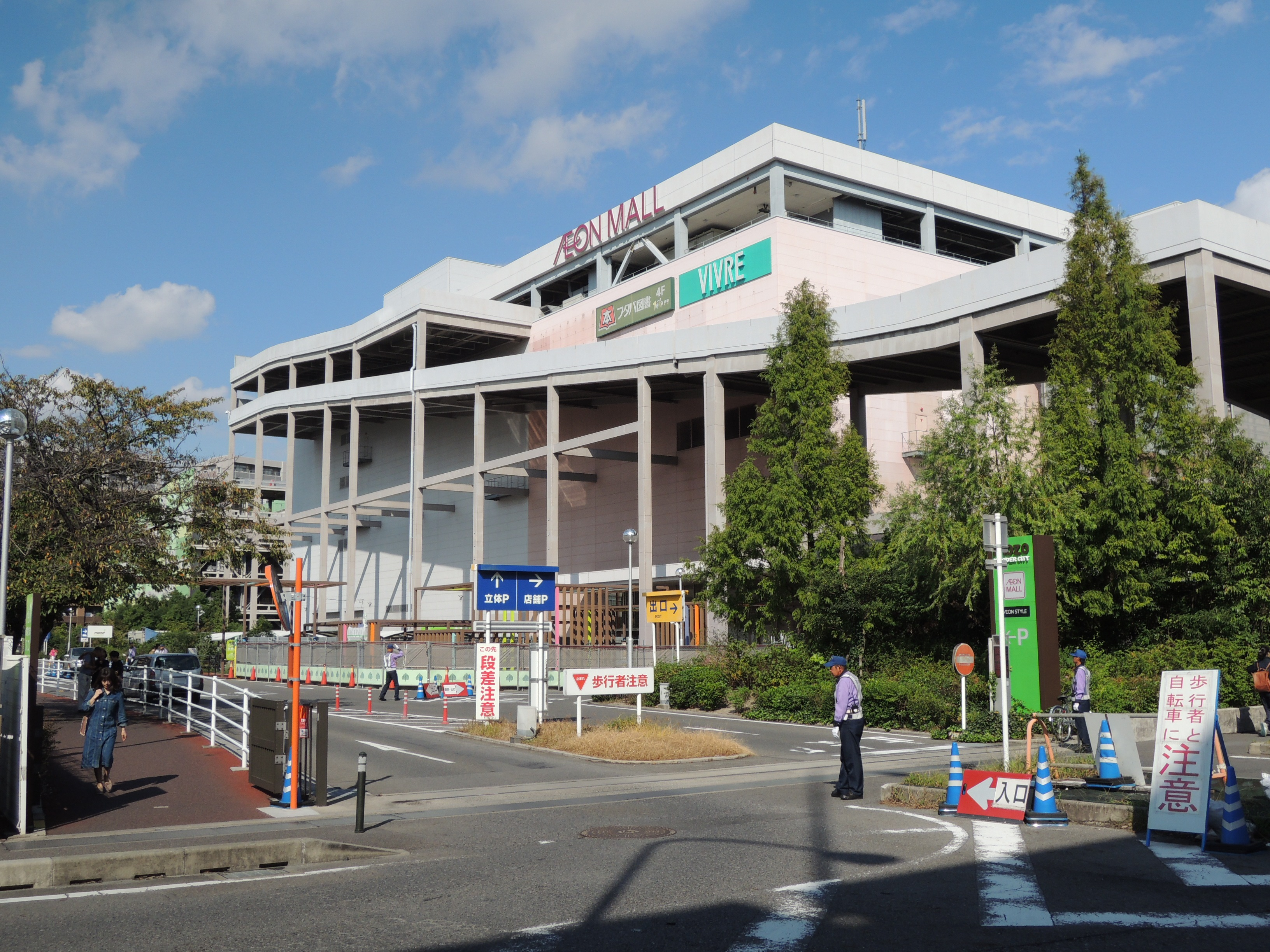 mozoワンダーシティ 西側入口・上小田井駅方面(Ｄ１入口側）